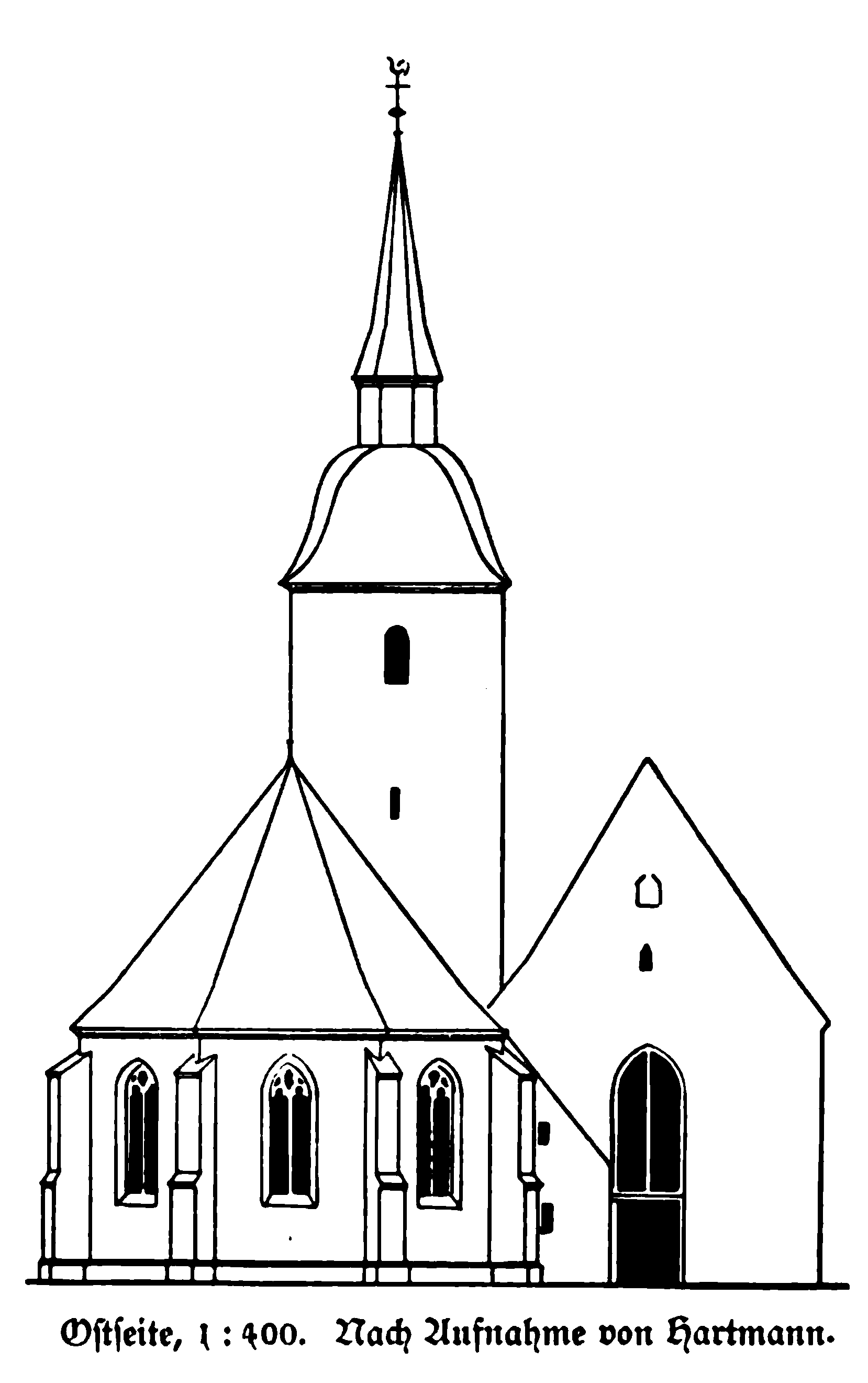 Ostseite der Ev. Kirche in Levern, Gemeinde Stemwede